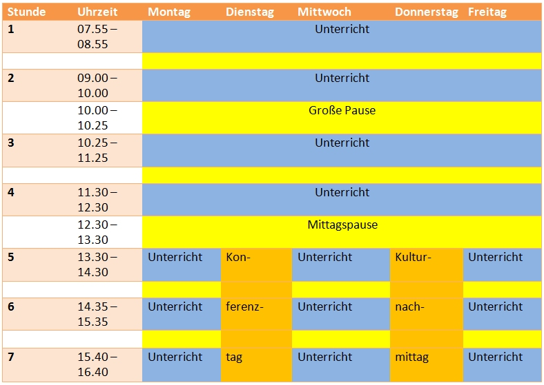 Neue Stundentafel des Dietrich-Bonhoeffer-Gymnasiums in Hilden: Der Unterrichtstakt wurde von 45 Minuten auf 60 Minuten angehoben, um die Verkürzung der gymnasialen Schullaufbahn von neun auf acht Jahre in NRW aufzufangen.